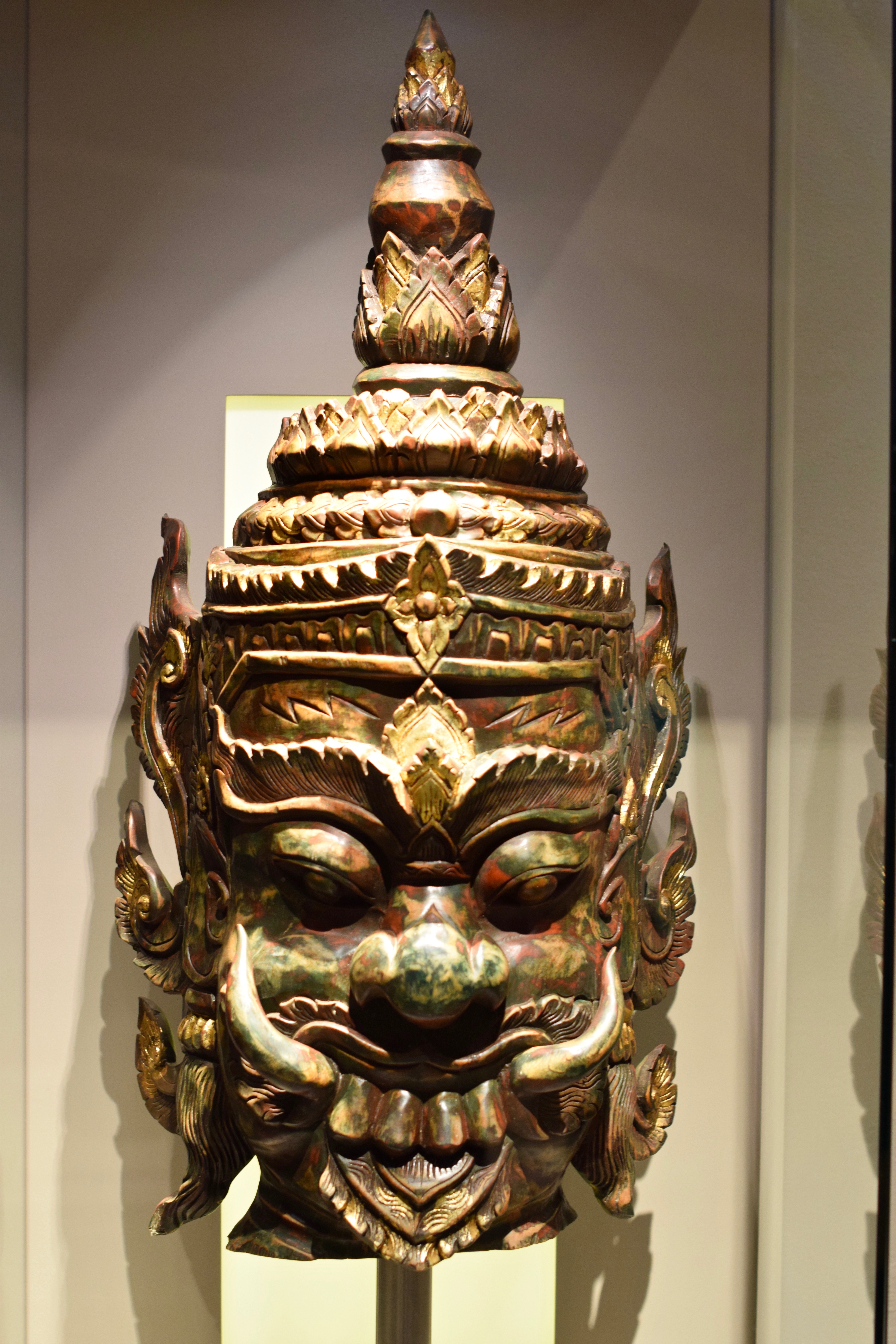 Cabeza de Hanuman de Tailandia